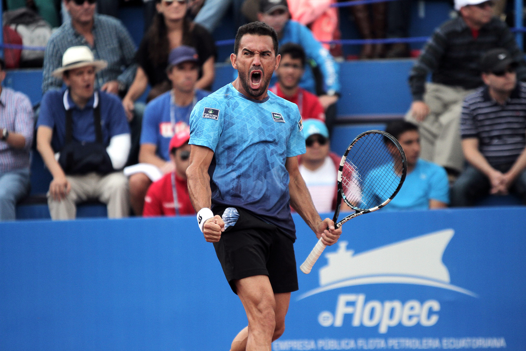 Quito, 08 feb (ANDES).- Final ATP 250 Ecuador Open Quito donde compitieron por el campeonato los tenistas Victor Estrella y Feliciano López. Fotografías: Carlos Rodríguez/ANDES.